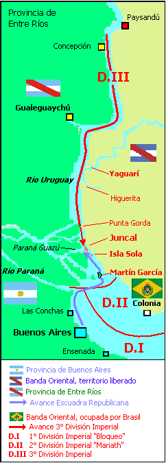 Guerra del Brasil, Río Uruguay 02/1827